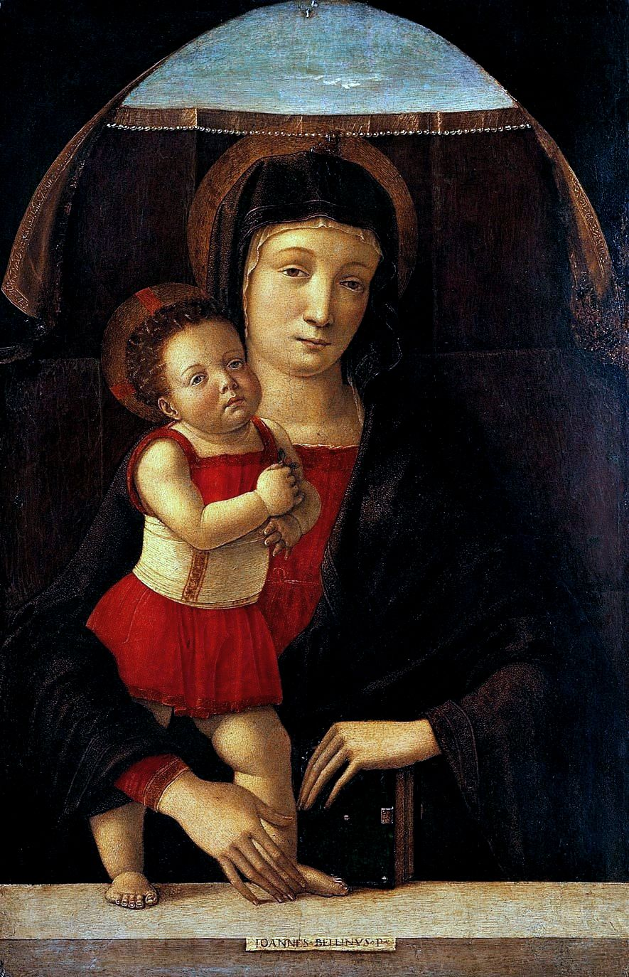 Джованни_Беллини._Мадонна_с_младенцем.__1450-55_Городской_музей_(Пинакотека_Маласпина),_Павия